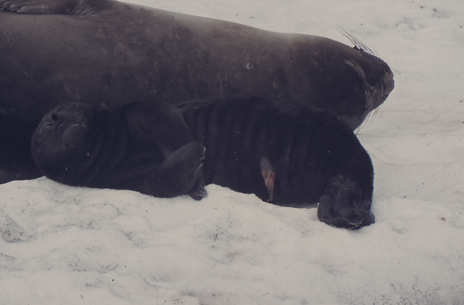 Cría de Lobo Marino en la Península Potter